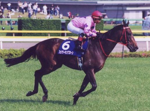 フェアリーキングプローン（2001年6月3日、東京競馬場で撮影、撮影者 Goki） Fairy King Prawn(at Tokyo race cource, Jun 3rd 2001)